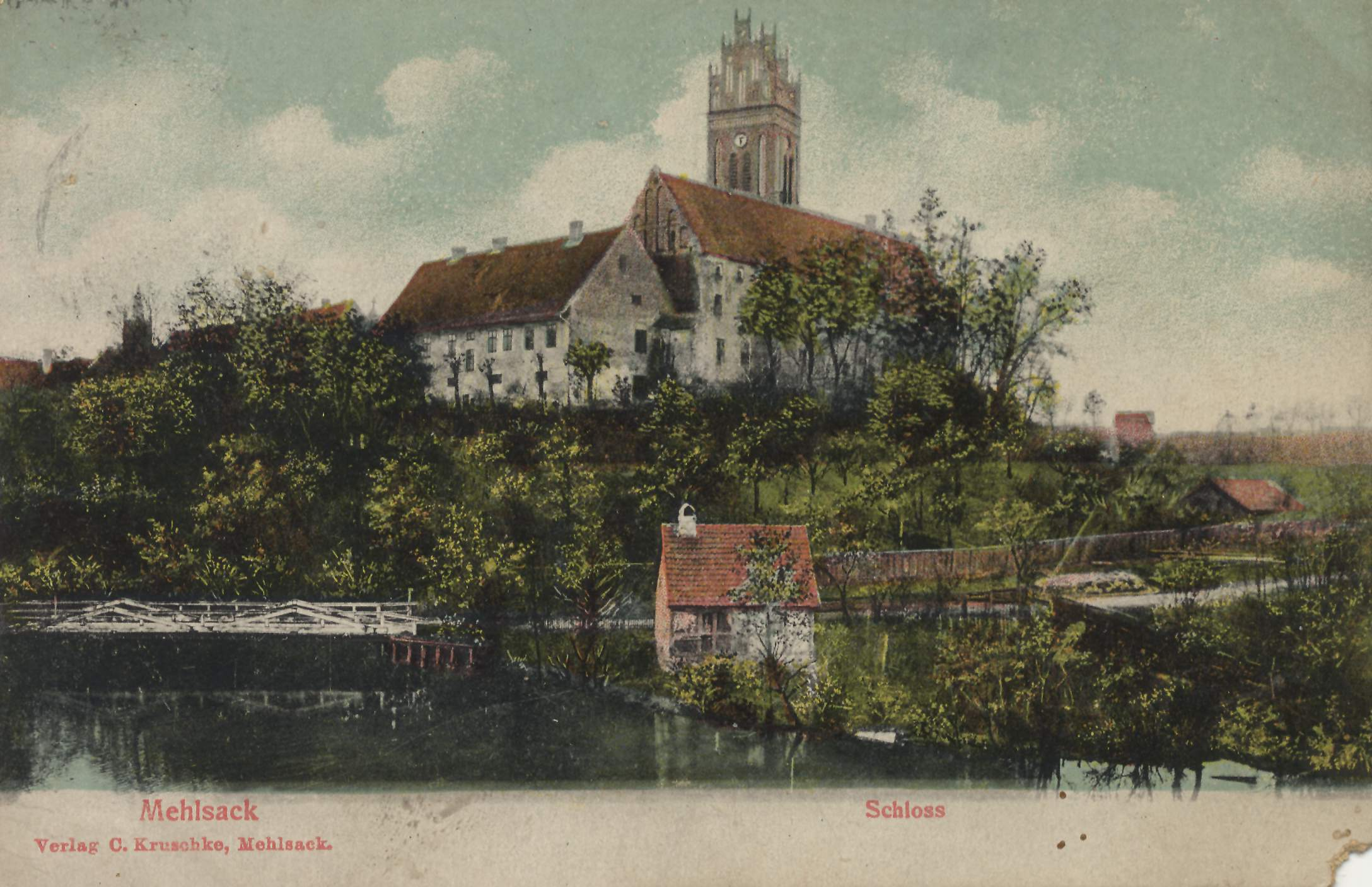 Schloss